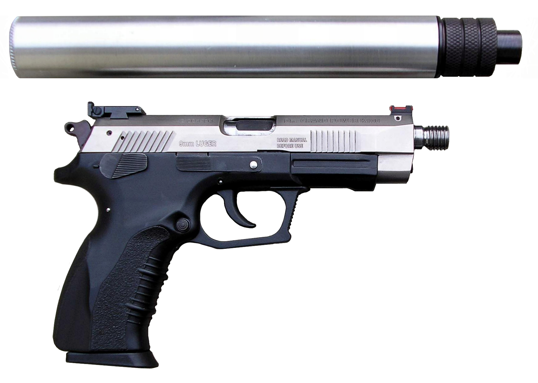 Grand Power pistol